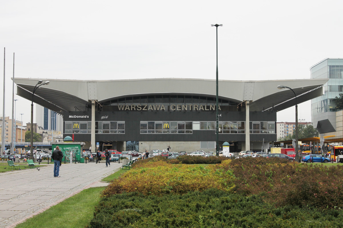 Budynek dworca Warszawa Centralna. This photo was taken during Railway Wikiexpedition 2014 set up by Wikimedia Polska Association in cooperation with Fundacja Grupy PKP.You can see all photographs in category Wikiekspedycja kolejowa 2014.